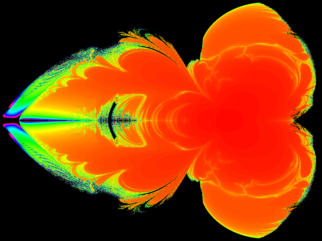 Obrázek, který ilustruje komplexní systém